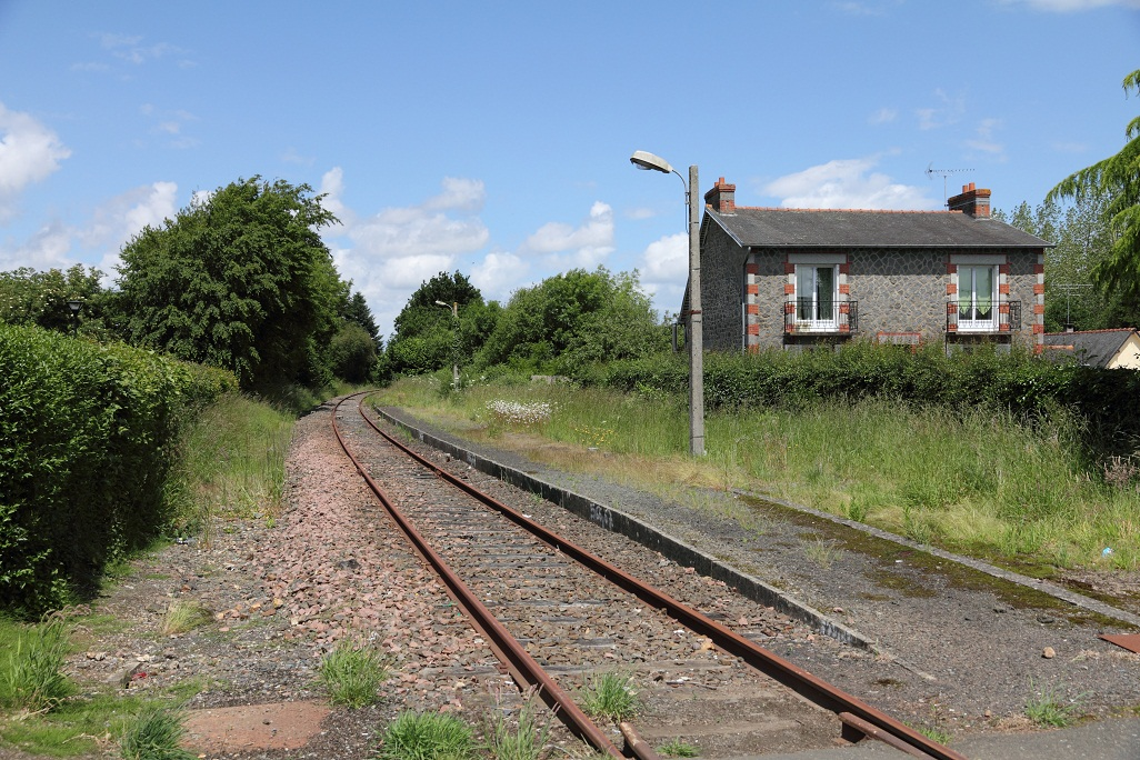 Vu du quai de la gare de Saint-Julien (Côtes d'Armor) en direction de Saint-Brieuc en juin 2012, Bretagne, France.